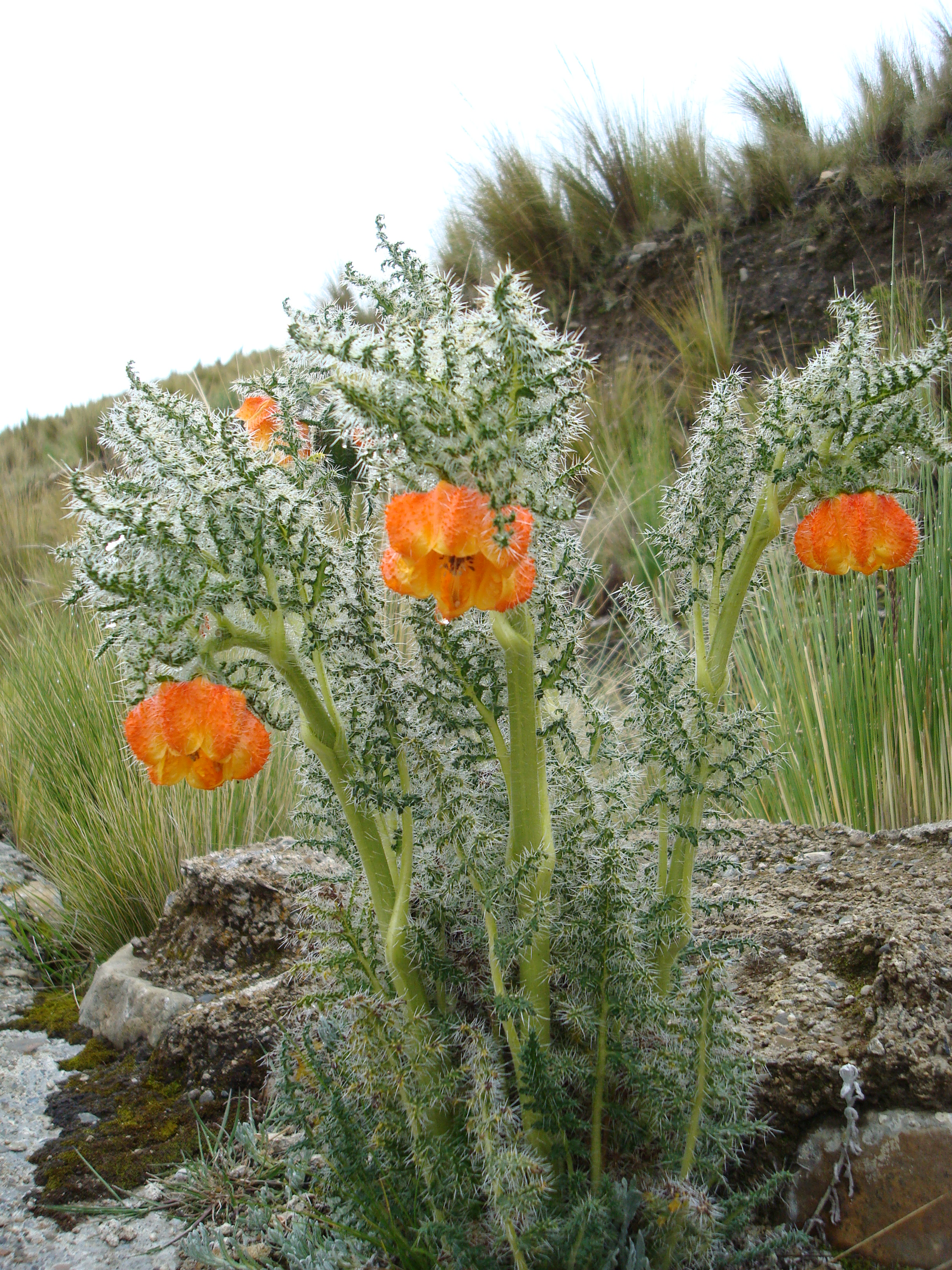 Arbusto de Caiophora boliviana.